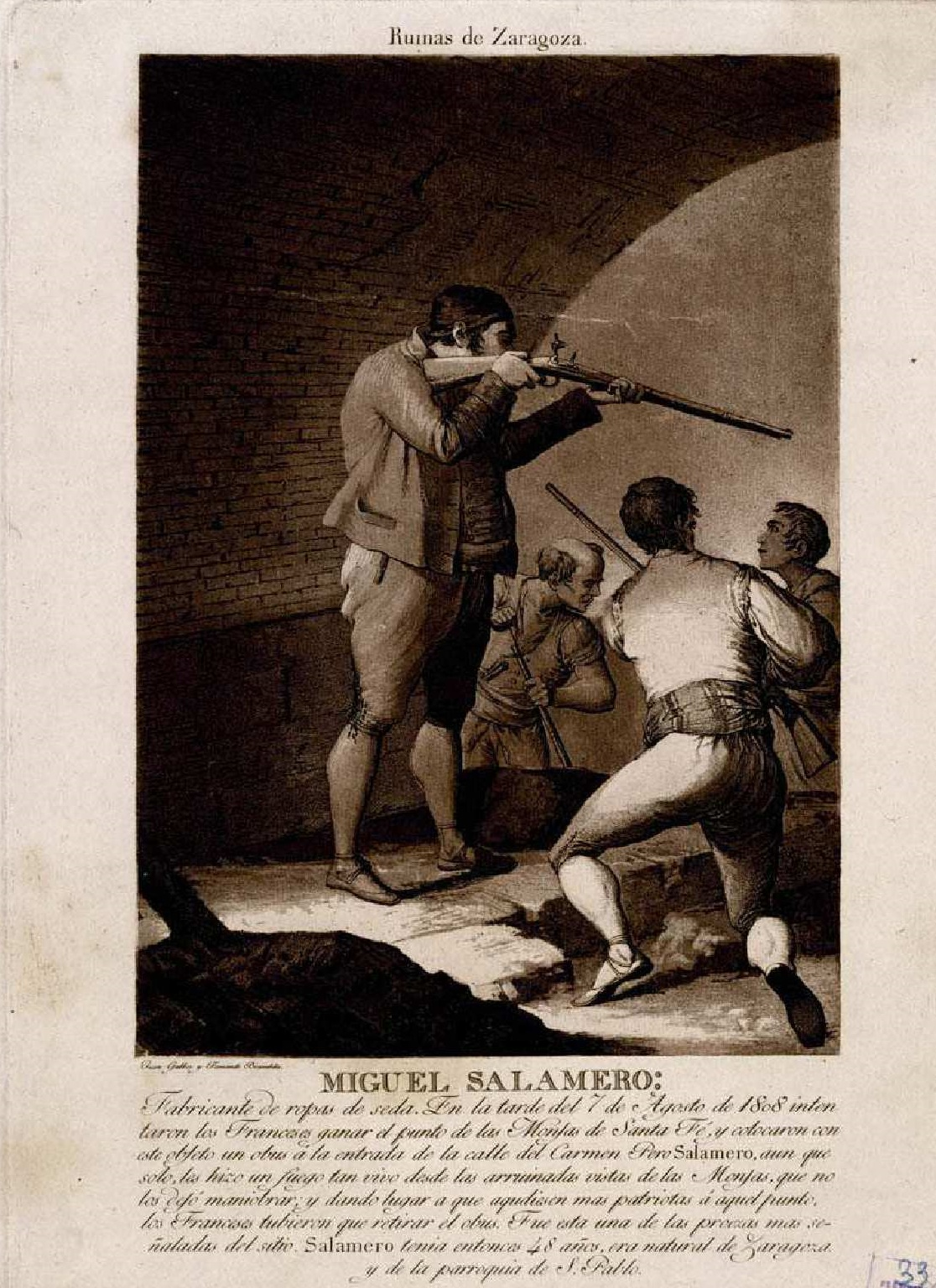 Miguel Salamero, aguafuerte y aguatinta de Juan Gálvez y Fernando Brambila para la serie Ruinas de Zaragoza. Inscripción: MIGUEL SALAMERO: Fabricante de ropas de seda. En la tarde del 7 de Agosto de 1808 intentaron los franceses ganar el punto de las Monjas de Santa Fé, y colocaron con este objeto un obús a la entrada de la calle del Carmen. Pero Salamero, aun que solo, les hizo un fuego tan vivo desde las arruinadas vistas de las Monjas, que no los dejó maniobrar; y dando lugar a que acudiesen mas patriotas á aquel punto, los Franceses tubieron que retirar el obus. Fue esta una de las proezas mas señaladas del sitio. Salamero tenía entonces 48 años, era natural de Zaragoza y de la parroquia de S. Pablo. Biblioteca Nacional de España.